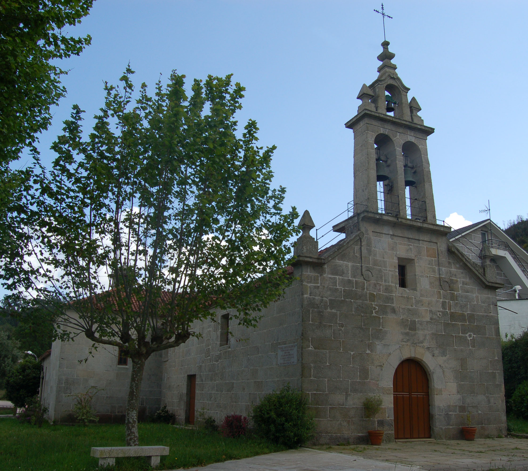 Igrexa parroquial de Santo Adrán de Cobres (Vilaboa)